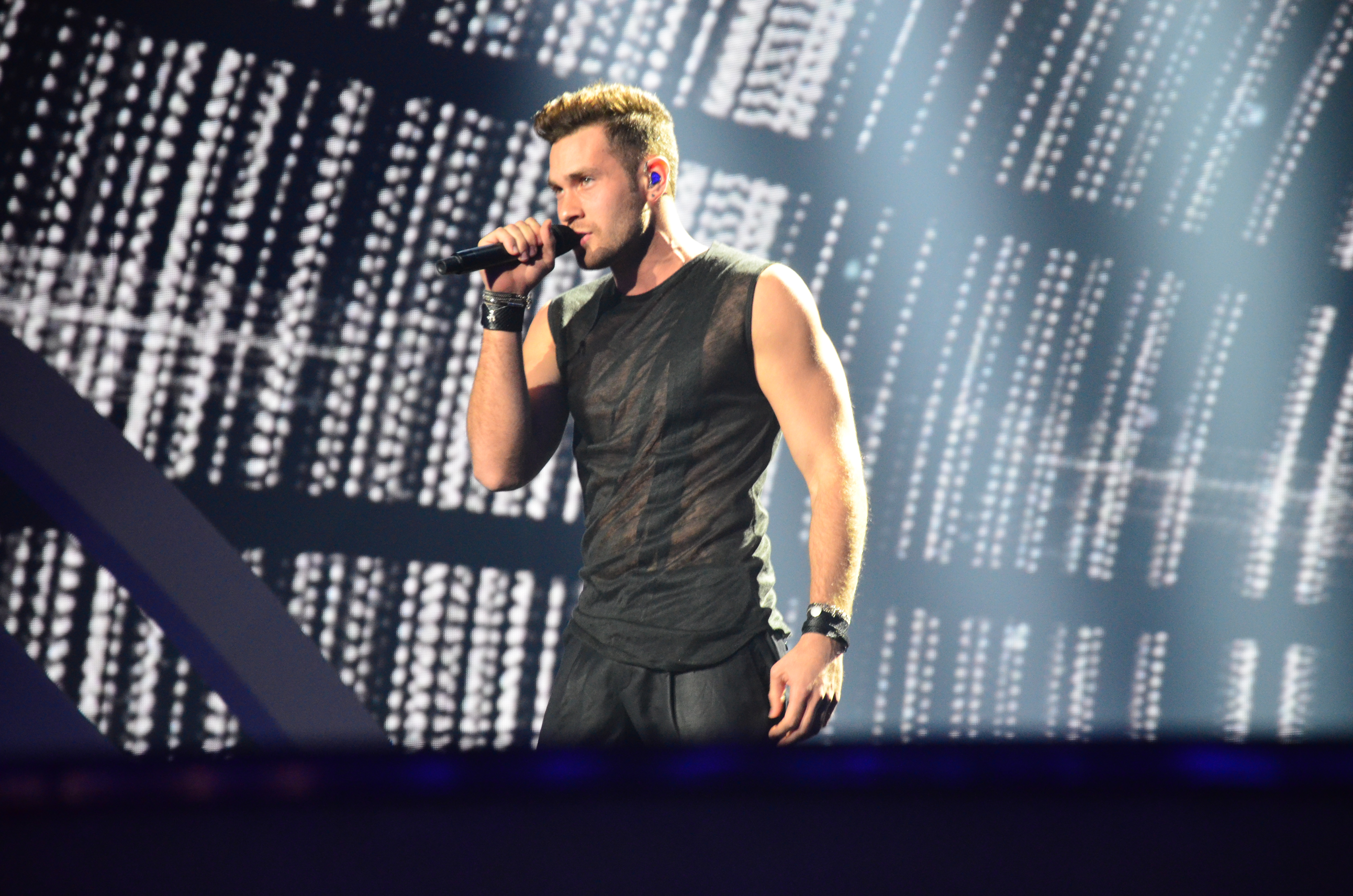 10 травня 2017 року у Києві відбулась генеральна репетиція 2 півфіналу "Євробачення".